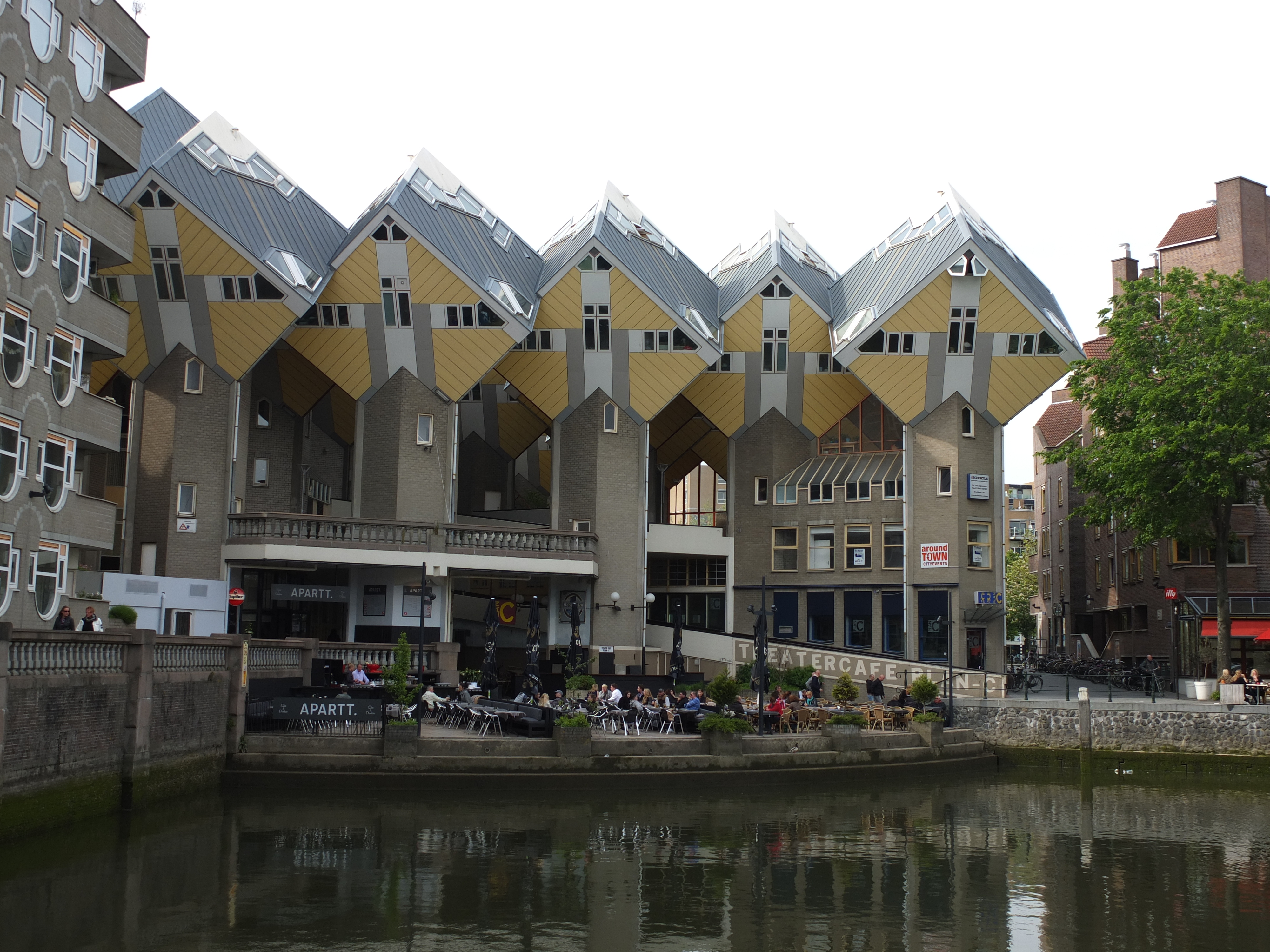 Blaakse Bos, kubuswoningen bij de Blaak